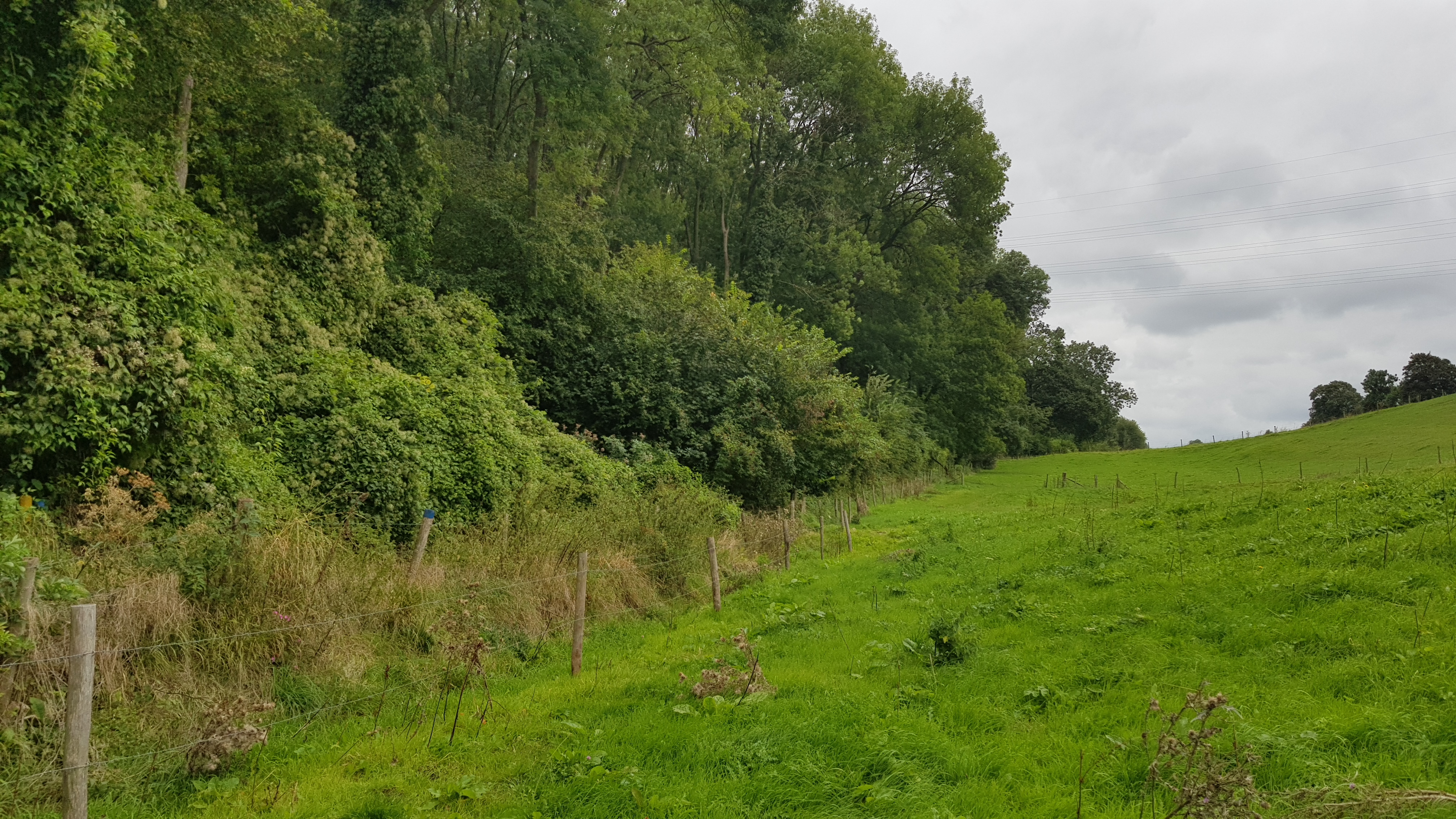 bron van de Putberg, bij Ubachsberg, Nederland